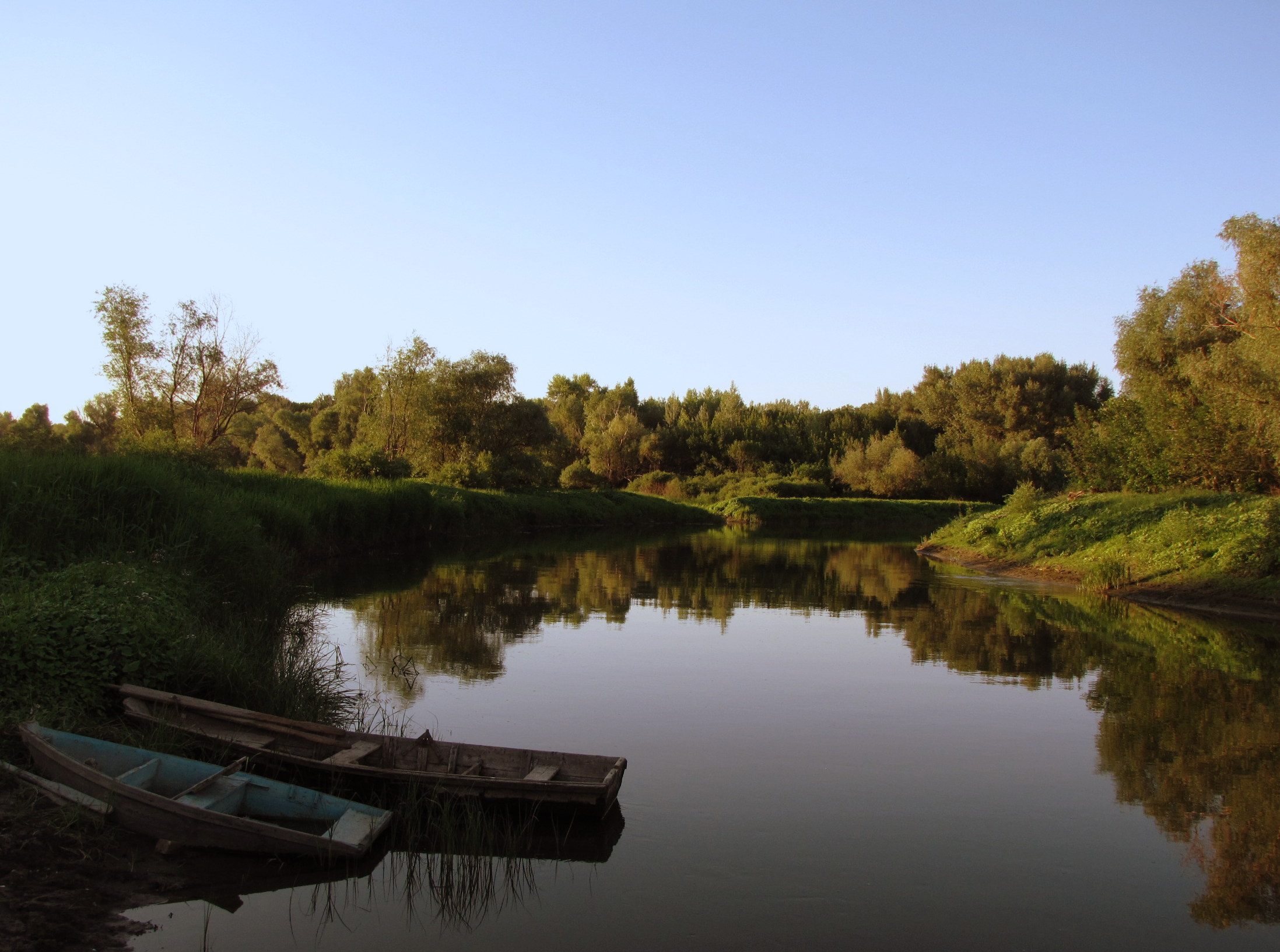 Донские плёсы